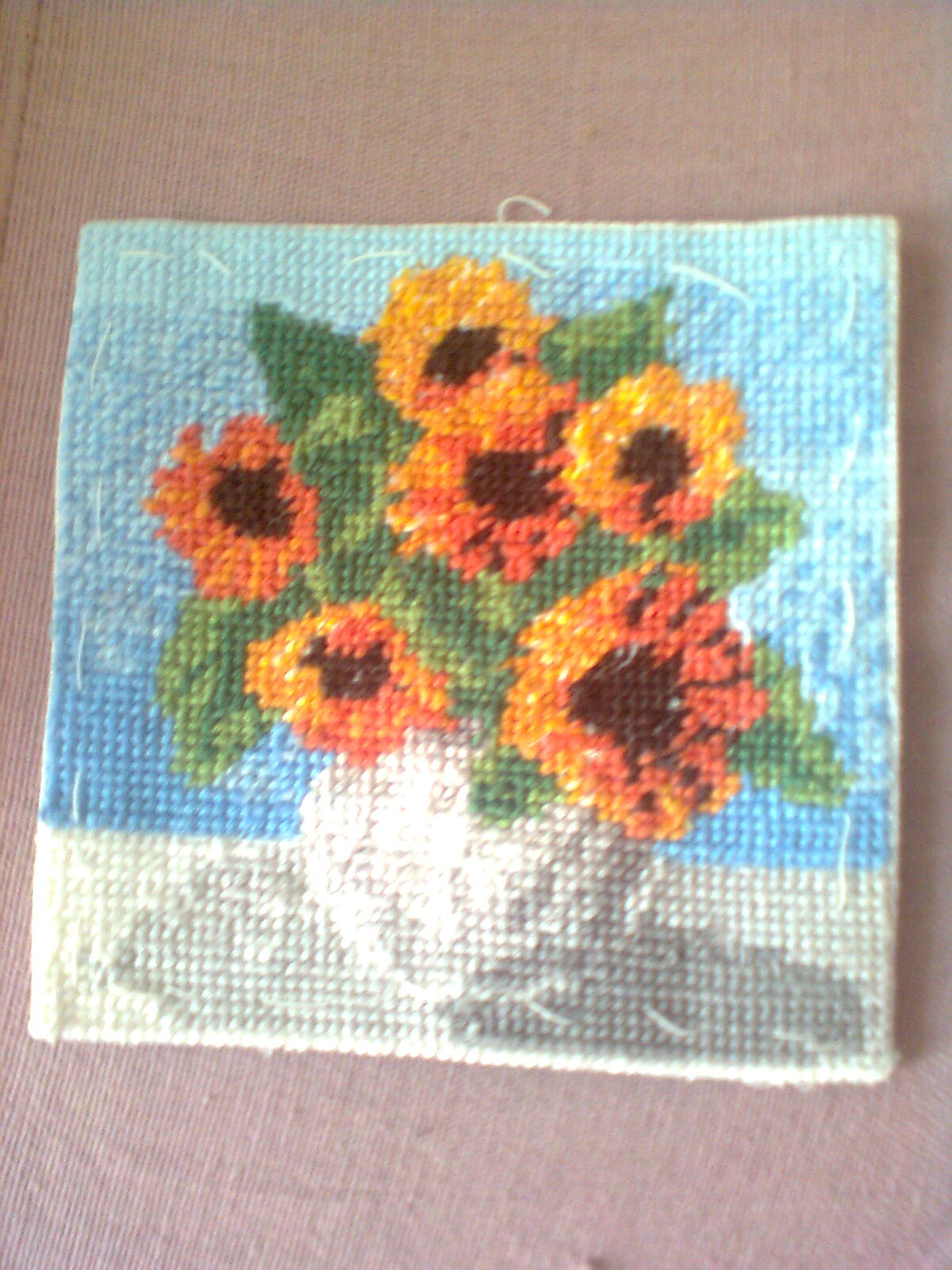 Napraforgó csokor vázában, gobelinhímzés, saját munka. A szegés még nincs kész, csak fércelt.